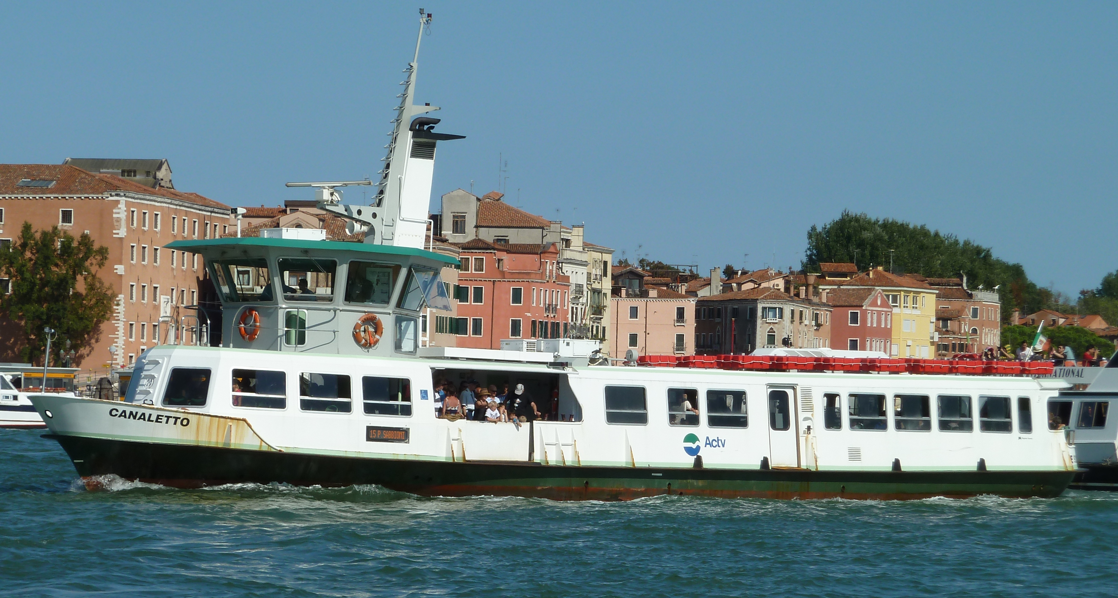 Canaletto bateau